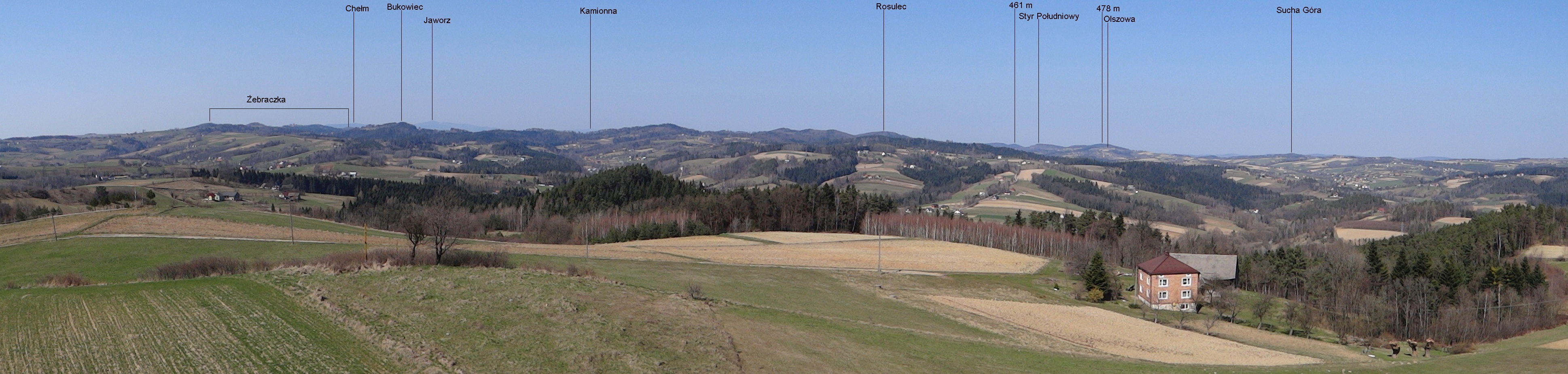 Panorama z wieży w Bruśniku w kierunku zachodnim i północnym